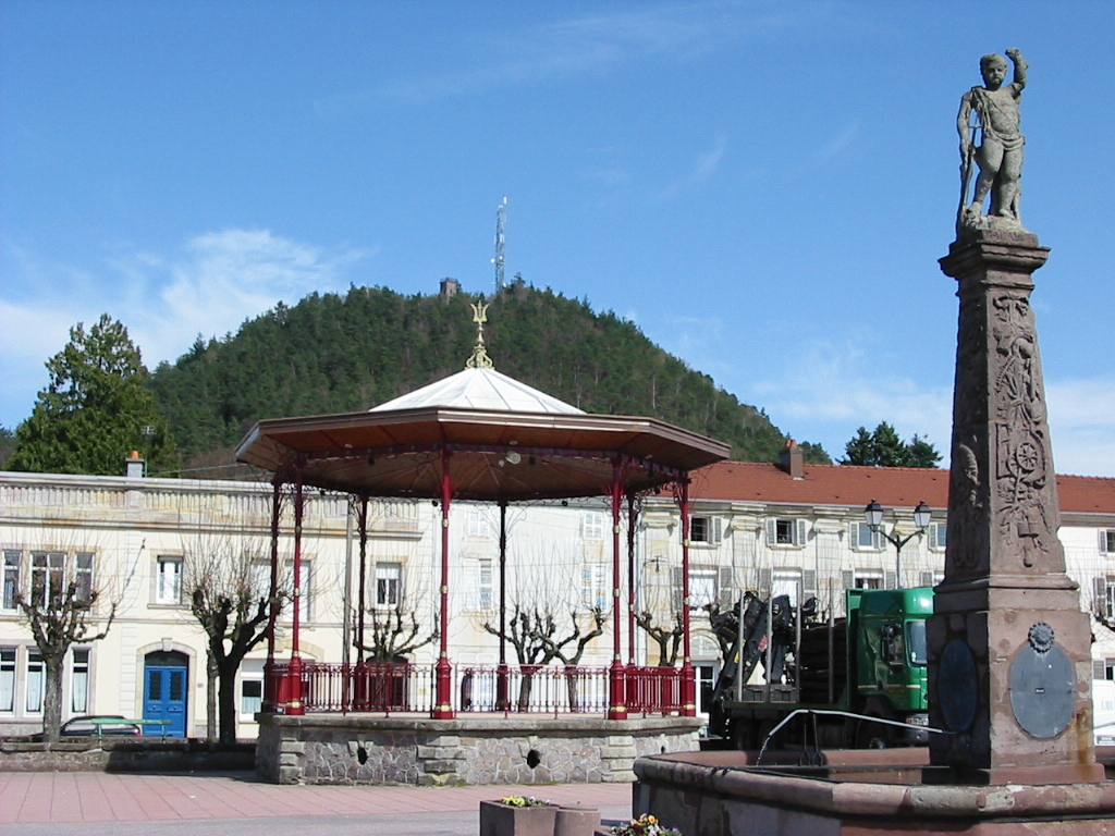 Bruyères (Vosges) : le Kiosque et la fontaine Neptune. À l'arrière-plan, l'Avison.